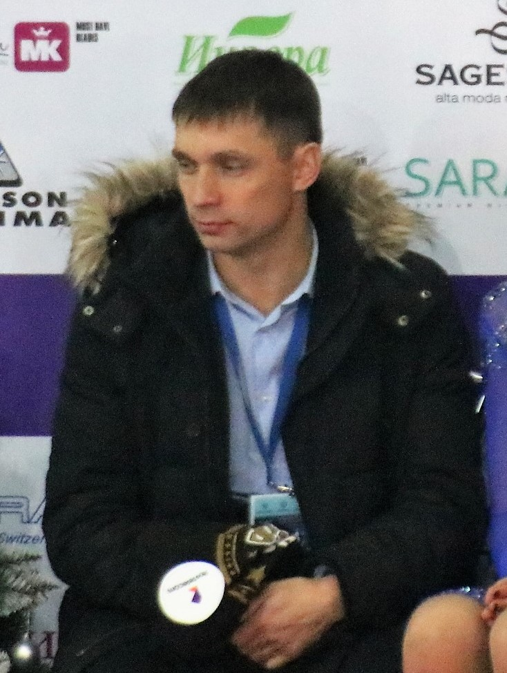 Анастасия Жирноклеева / Роман Мещанкин со своим тренером Дмитрием Наумкиным на чемпионате России по фигурному катанию на коньках 2019